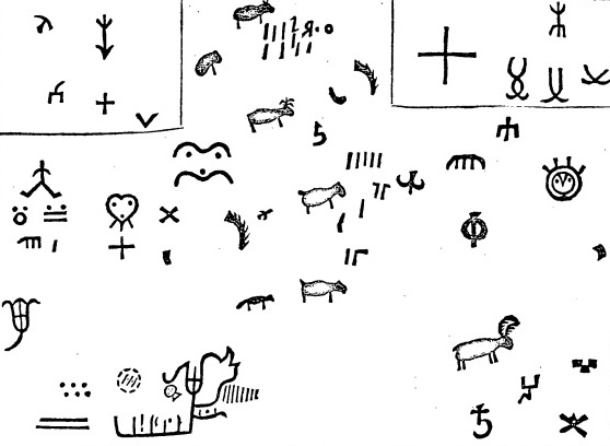 Наскальные изображения из книги "Das Nord-und Ostliche Theil von Europa und Asia"